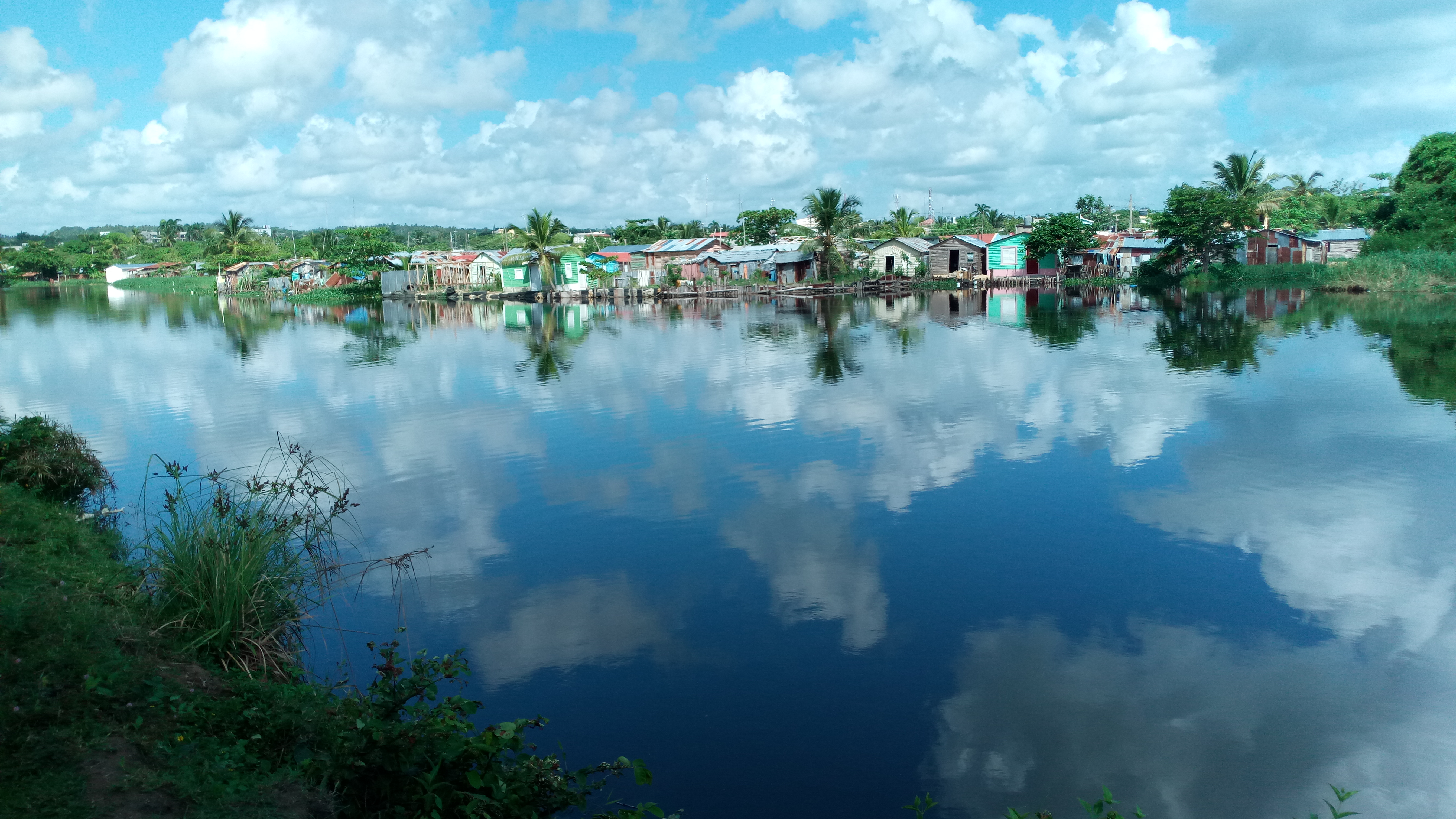 Situacion en el mes de Noviembre del año 2016 del rio nagua, donde se muestra el mal estado de las aguas del rio como resultado del alto nivel de contaminacion.